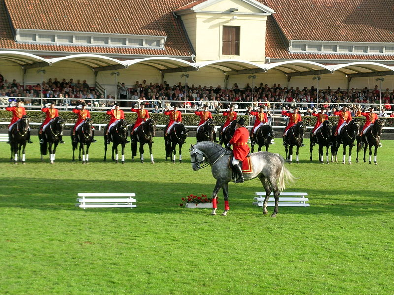 Vorführungen zur Hengstparade im Landgestüt Celle